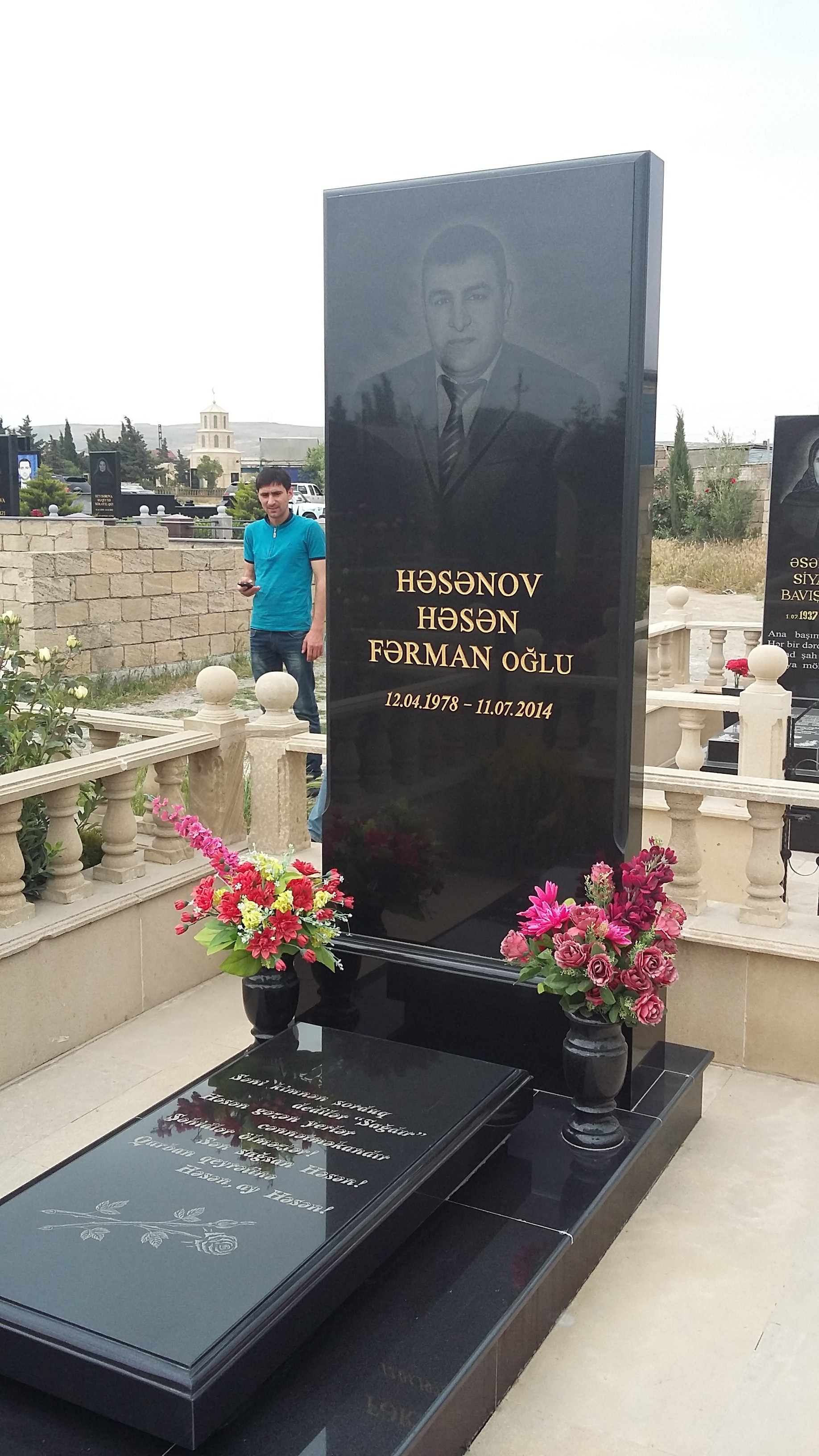 Həsənov Həsən Fərman oğlu (ermənilər öldürüb)